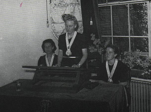 Bestuur MP